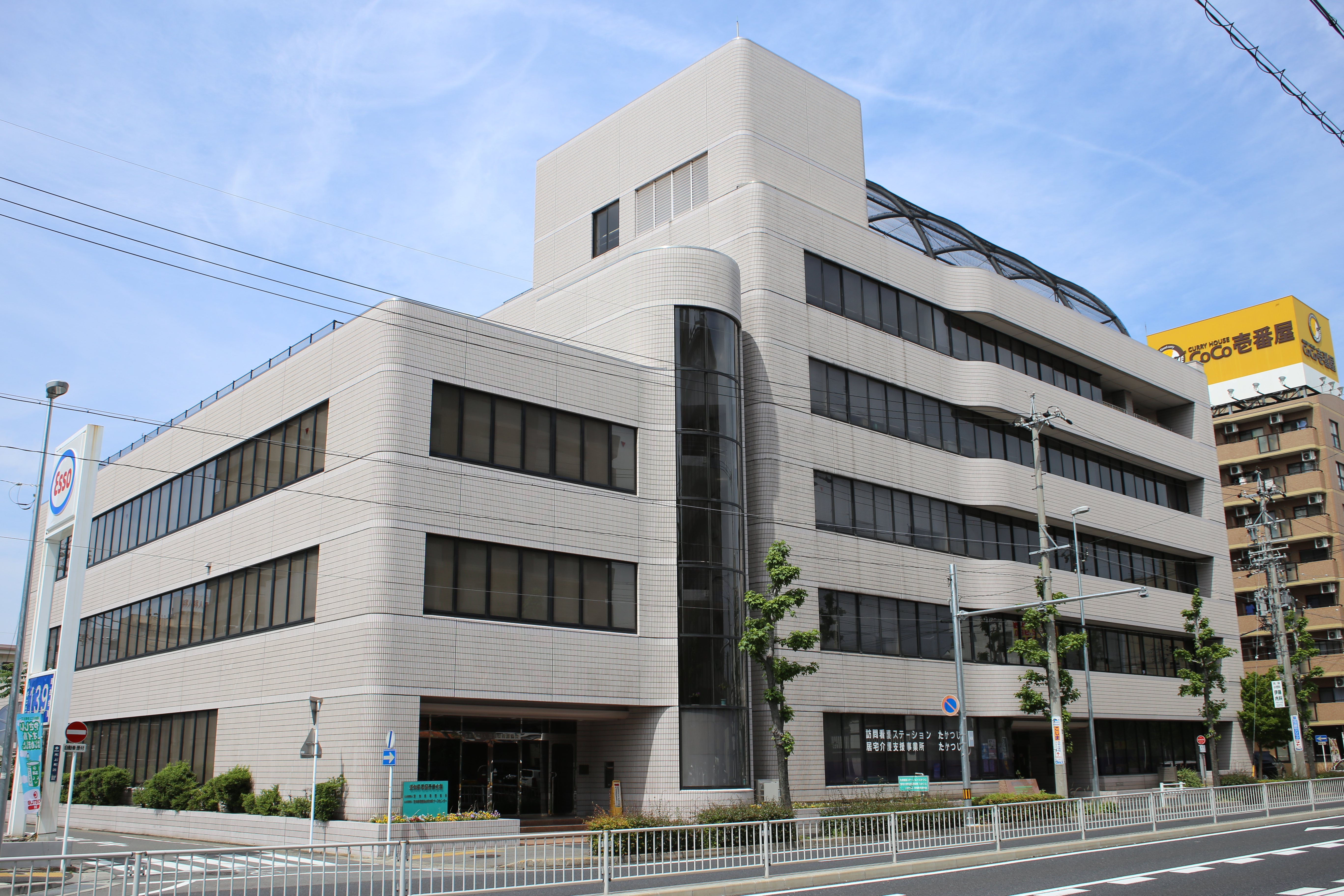 名古屋市昭和区円上町の愛知県看護研修センター（愛知県看護協会本部）を南側公道西側より撮影